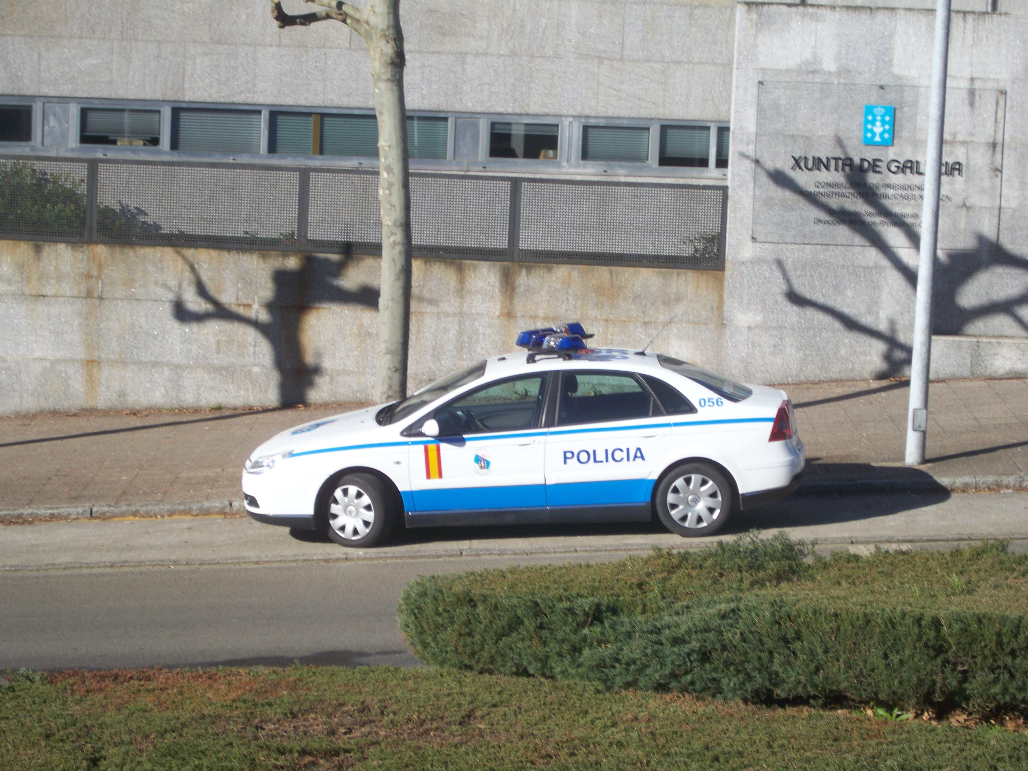 Vehiculo da Policía Autonómica Galega